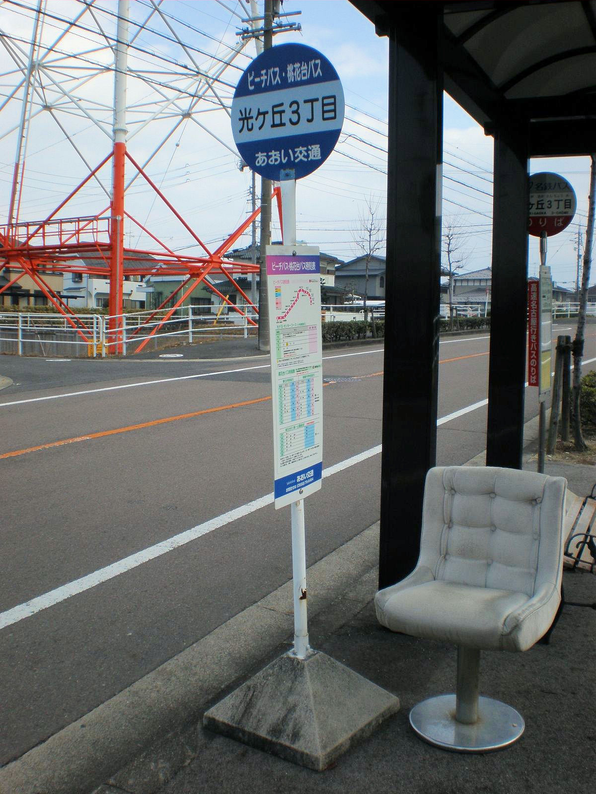 愛知県小牧市にあるあおい交通の光ヶ丘3丁目停留所